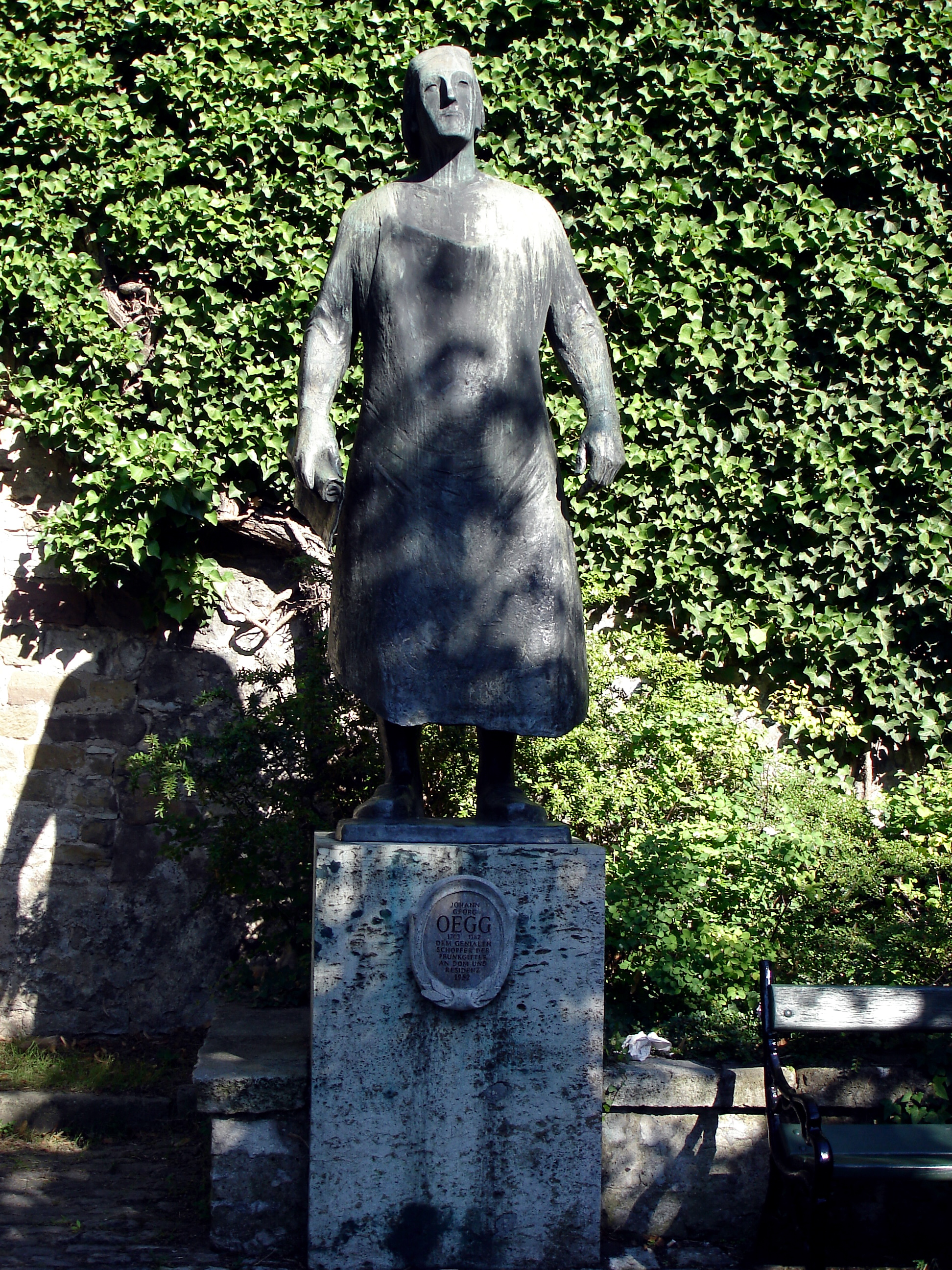 Johann Georg Oegg Statue in WÃ¼rzburg von Julius Bausenwein